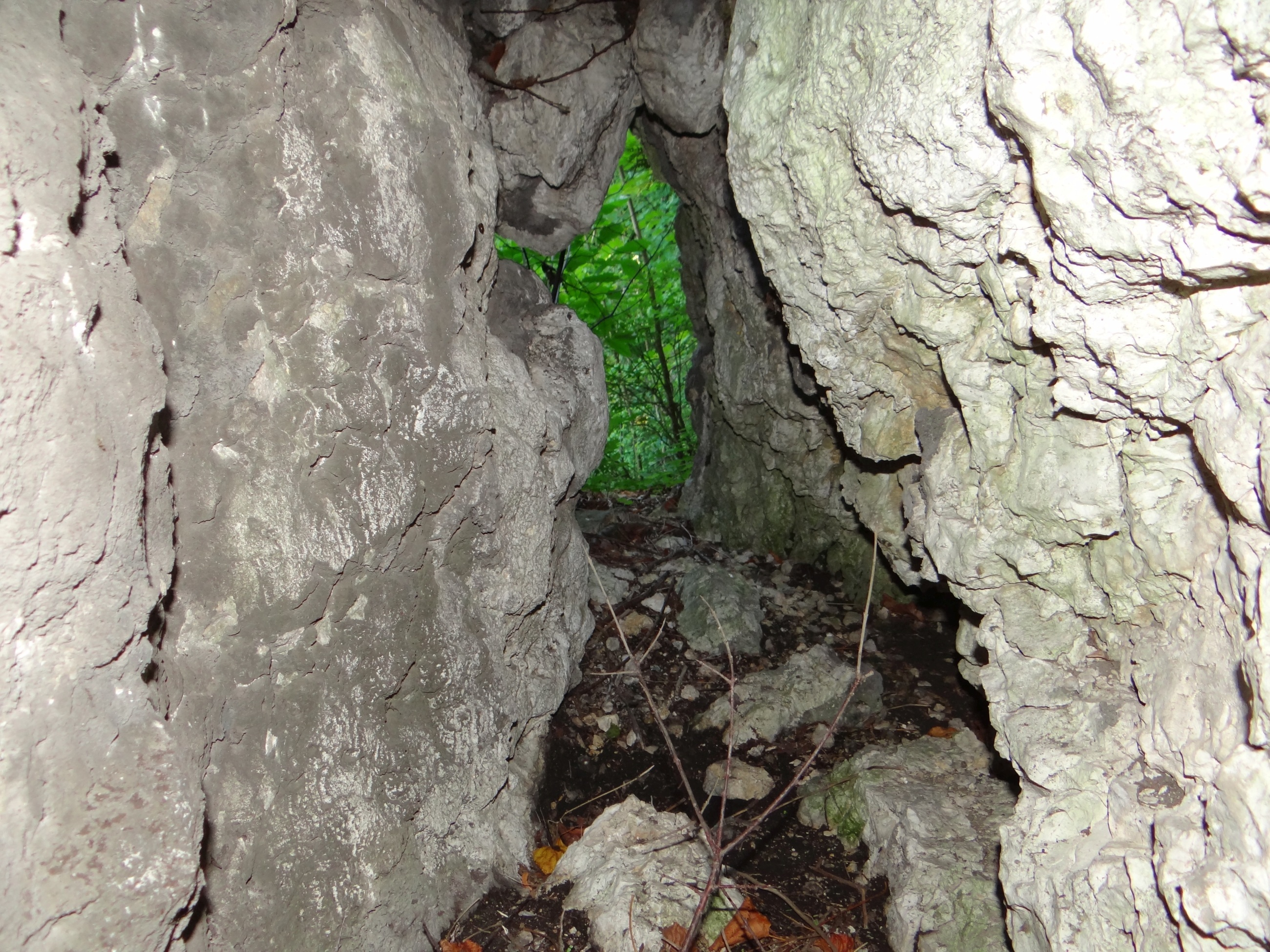 Schronisko na Półce w Igle